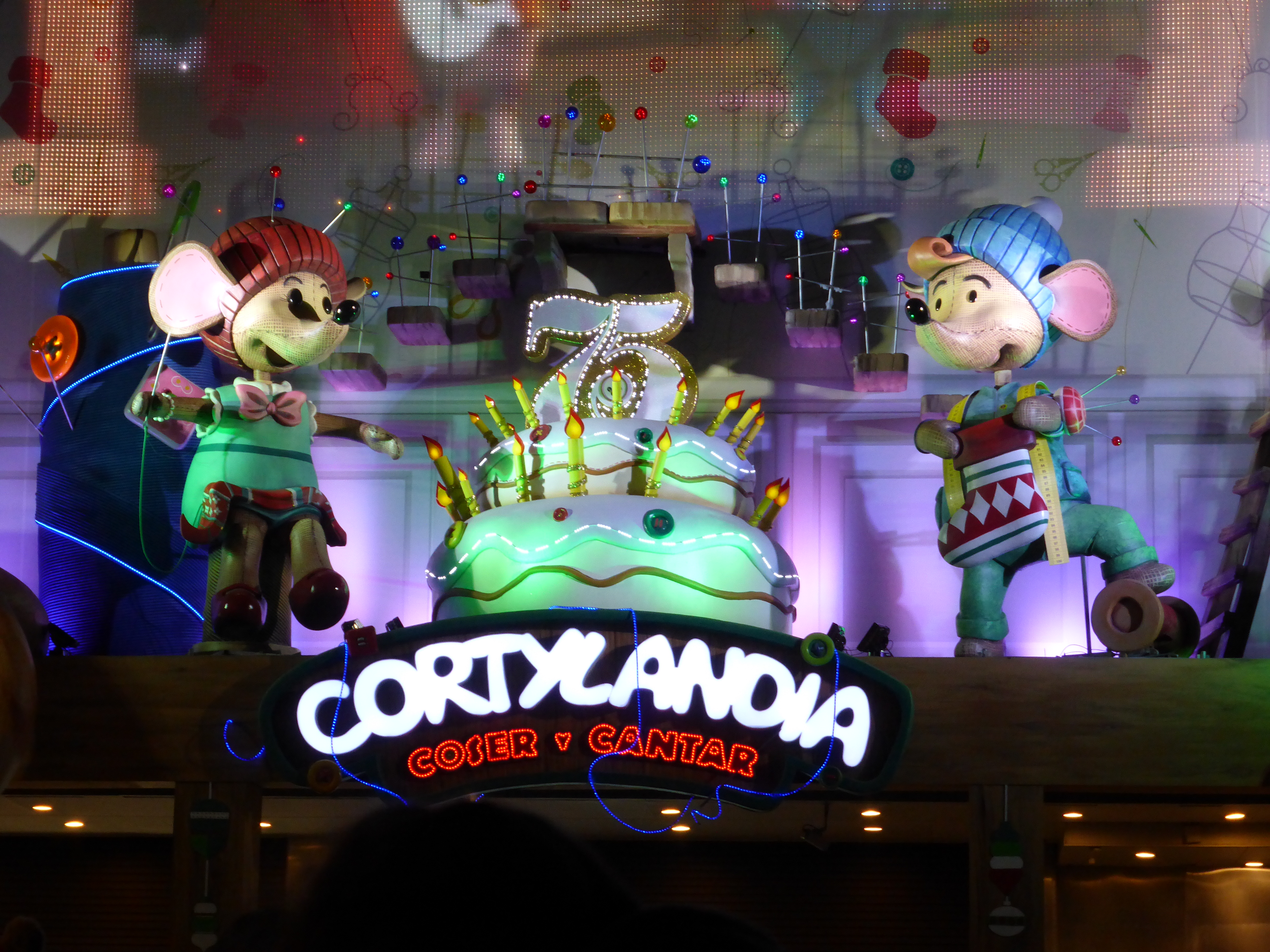 "Cortylandia, Cortylandia,... vamos todos a cantar...", es el estribillo del espectáculo infantil de El Corte Inglés, en la fachada exterior de la calle del Maestro Victoria, de Madrid (España), en Navidades. La foto es de finales de 2016. En este caso el espectáculo se titula "Coser y Cantar".